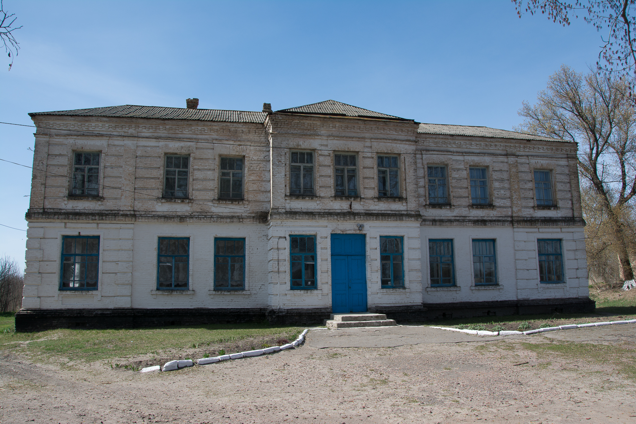 Будинок (мур.), село Веселинівка